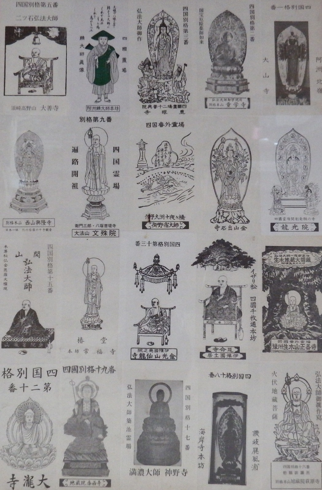 四国別格20霊場の御影